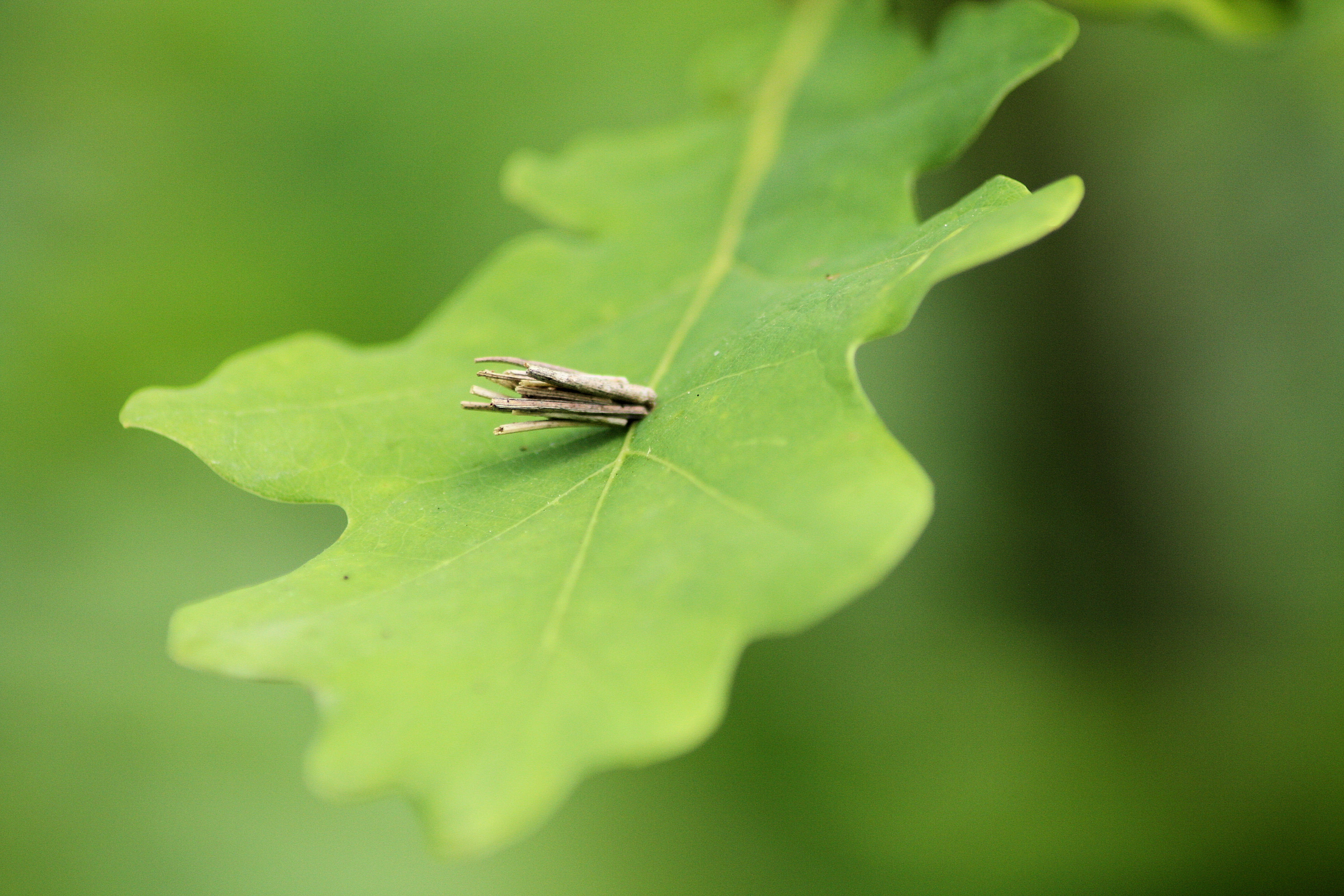 Kleiner Rauch-Sackträger (Sack)